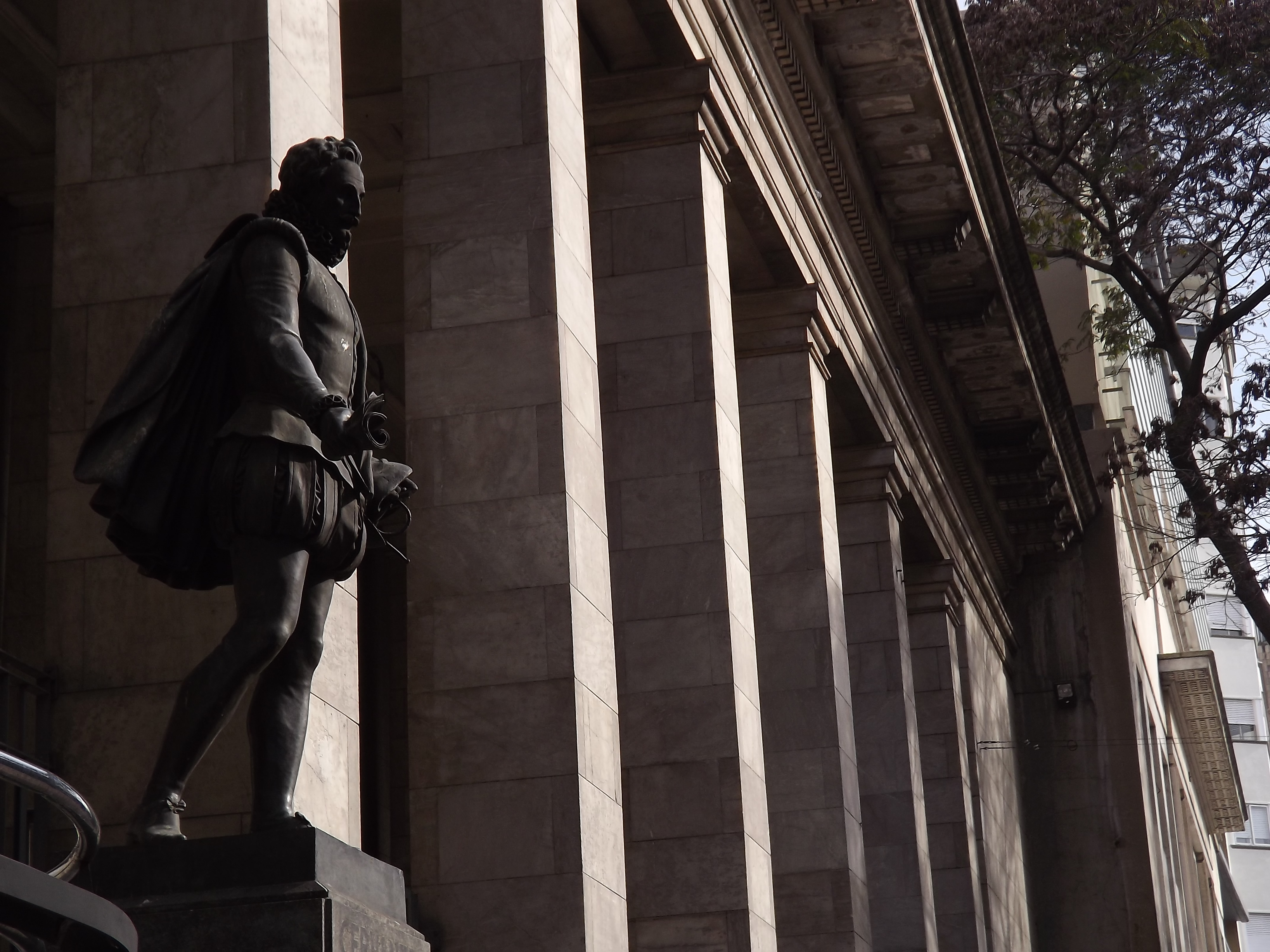 Miguel de Cervantes Saavedra. Ubicada en el departamento de Montevideo